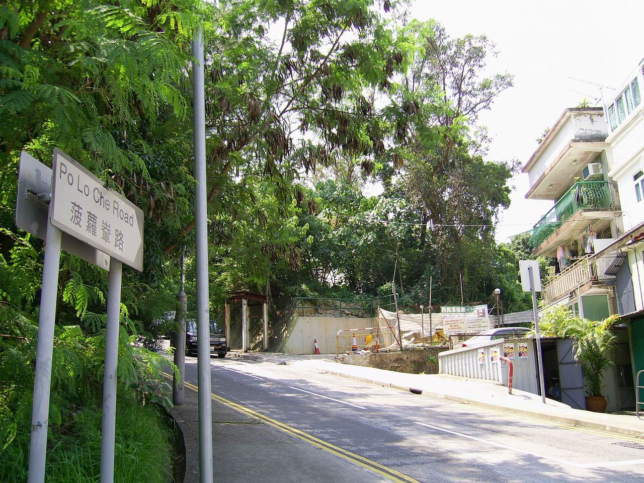 中文（香港）: 菠蘿輋路